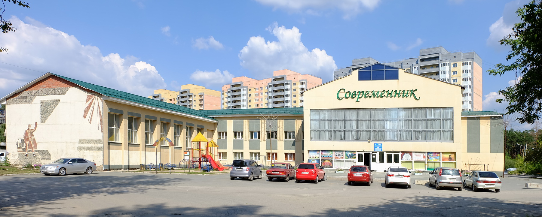 ДК Современник в Берёзовском по ул. Смирнова, 1